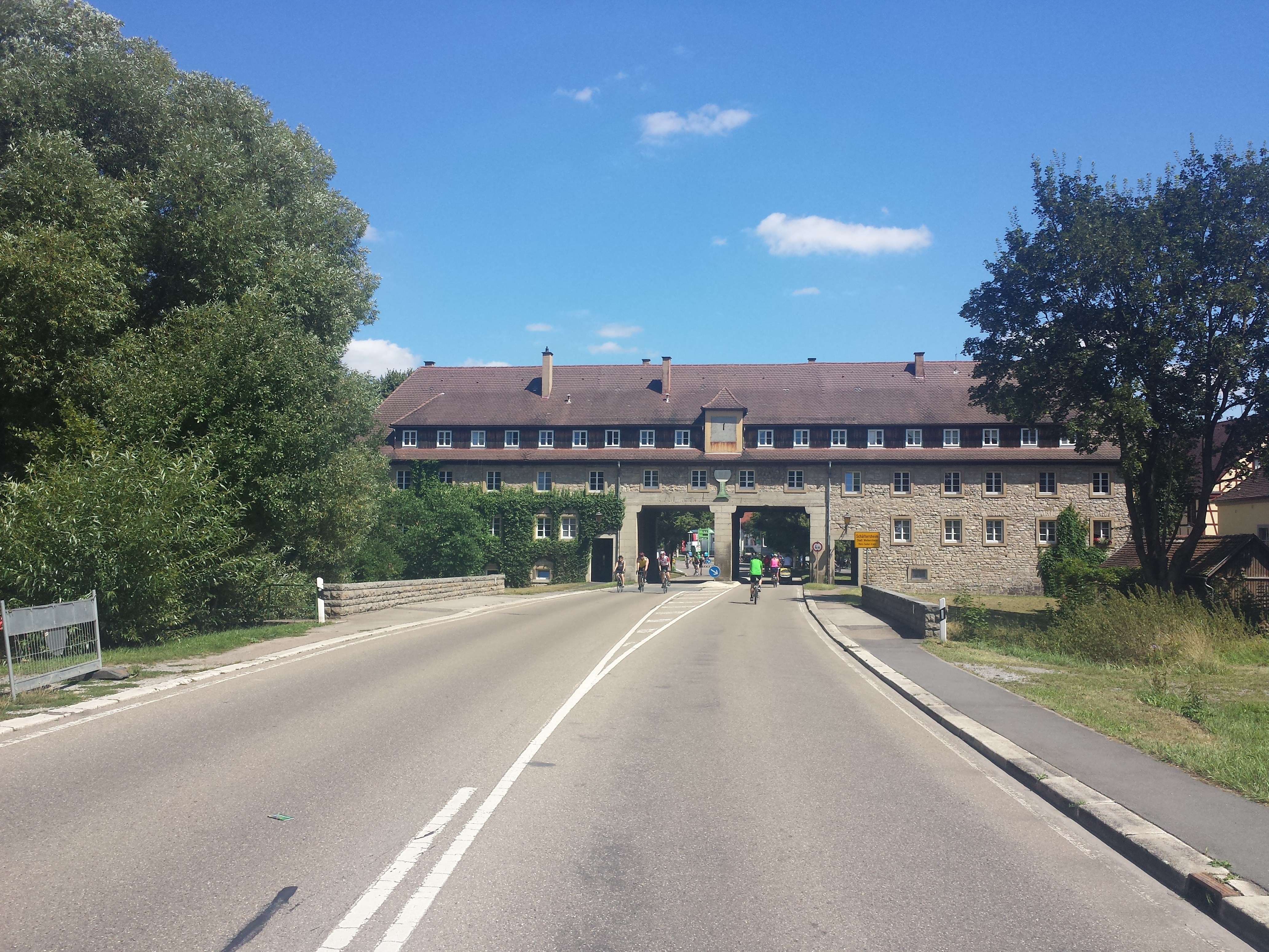 Autofreier Sonntag im Lieblichen Taubertal von Bad Mergentheim bis Rothenburg ob der Tauber/Detwang am 7. August 2016.